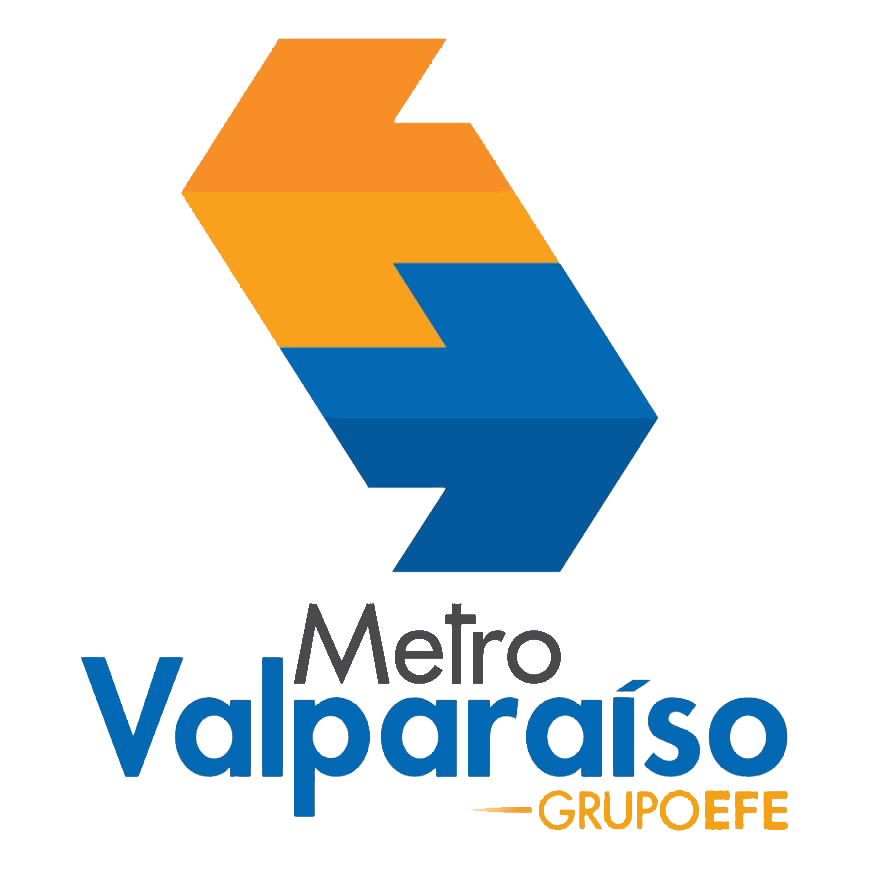 Reproducción del logotipo usado por Metro Valparaíso desde 2014.